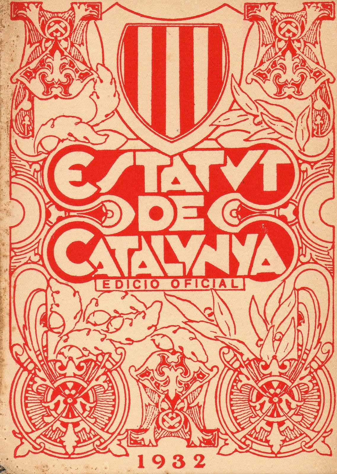 Portada original del Estatuto de Nuria